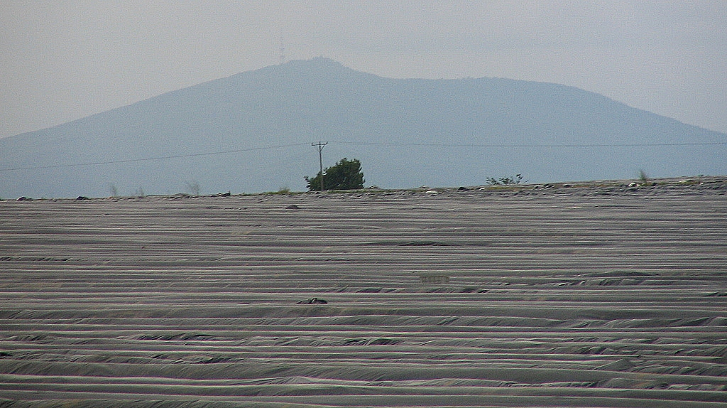 Ślęża widziana z okolicy Wojtkowic